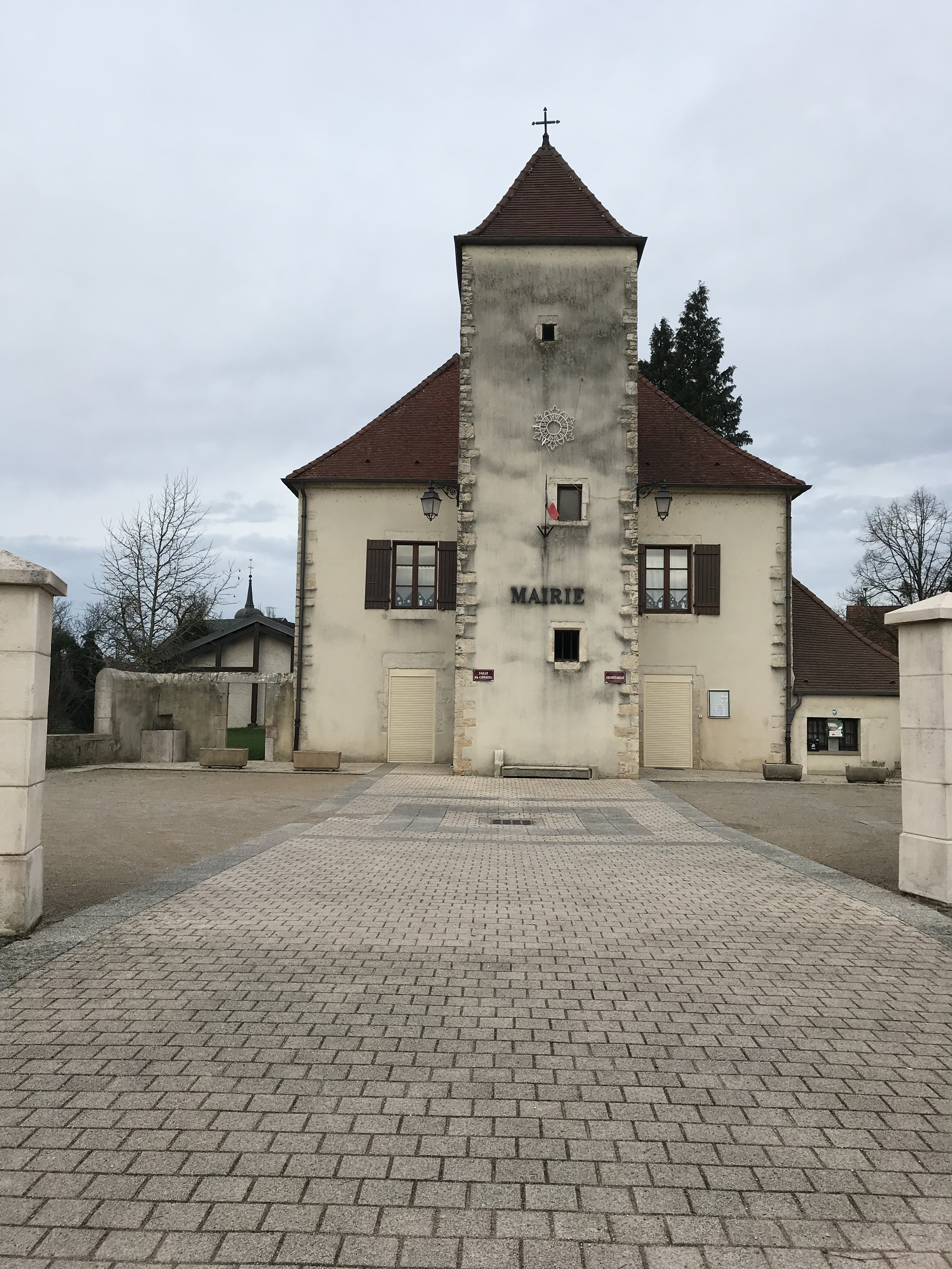 Image de Gevry (Jura, France) le 7 janvier 2018.